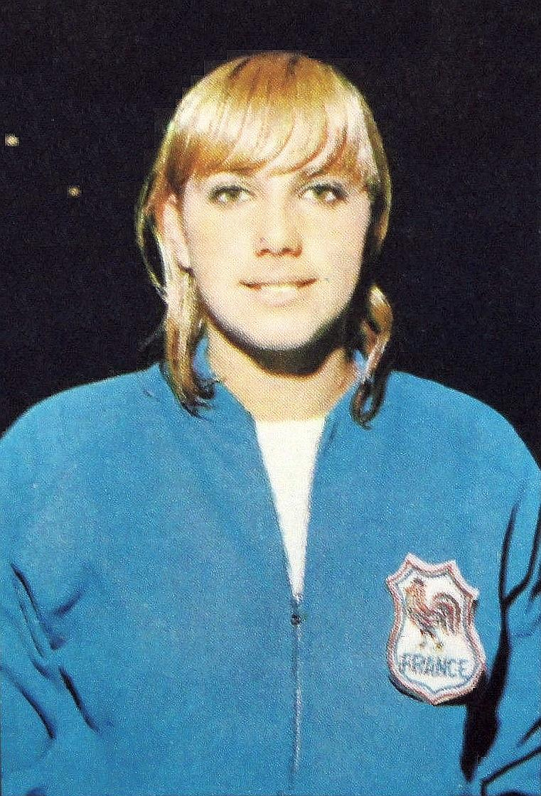 Christine 'Kiki' Caron en 1968 (JO) - Campioni dello Sport 1969-1970, n°280